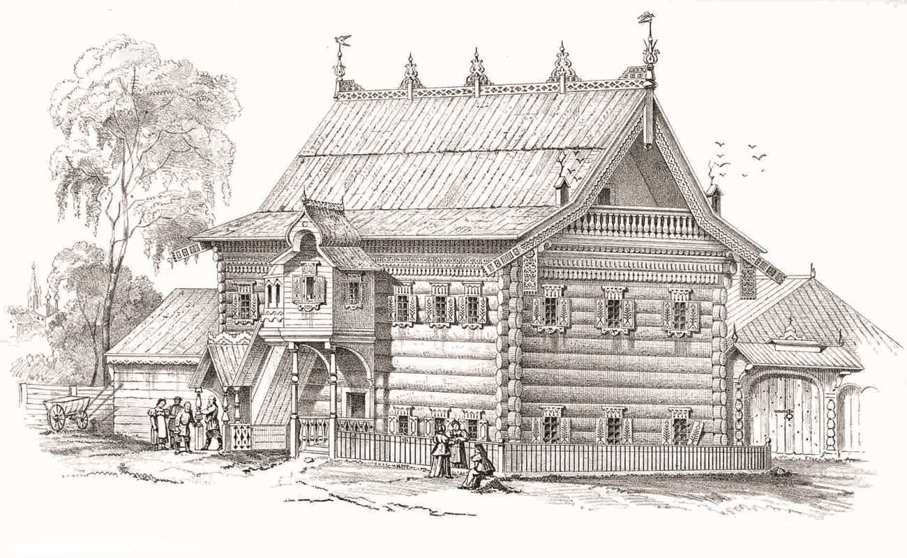 Вичуга, Россия